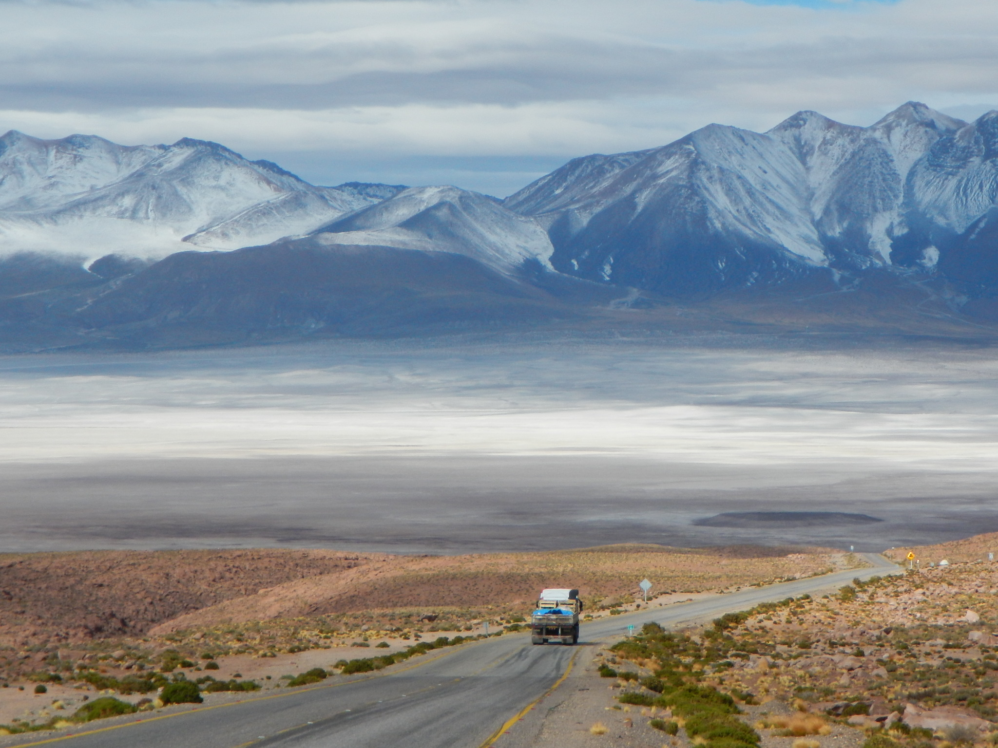 Vista desde la ruta que se dirige a la mina Collahuasi.